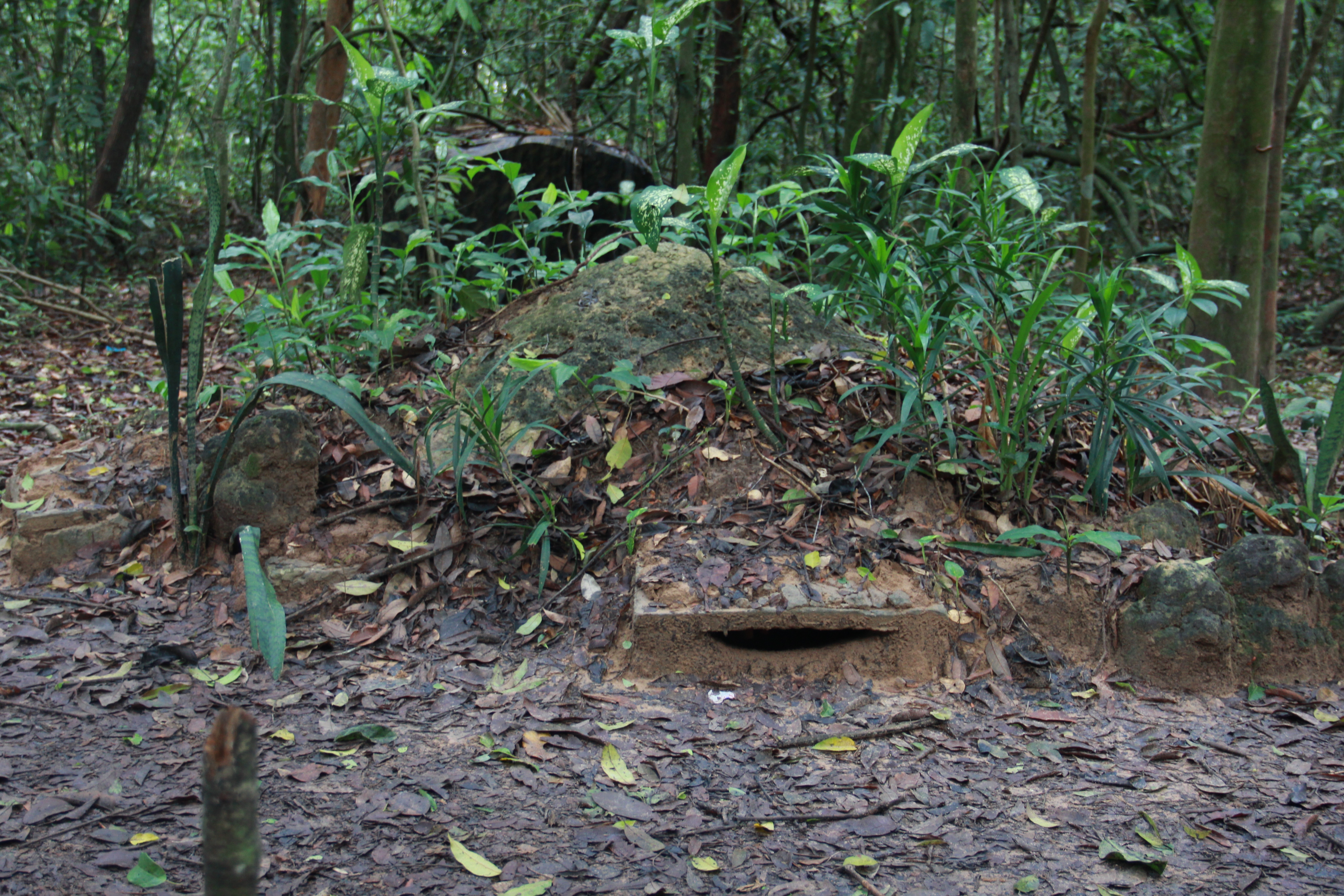 W Củ Chi Địa đạo Củ Chi ngụy trang